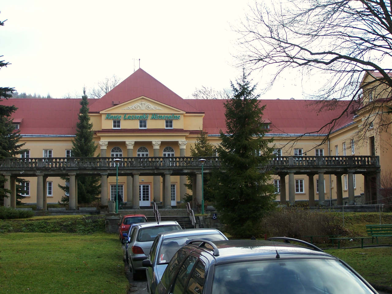 Nowe Łazienki (Krynica-Zdrój)